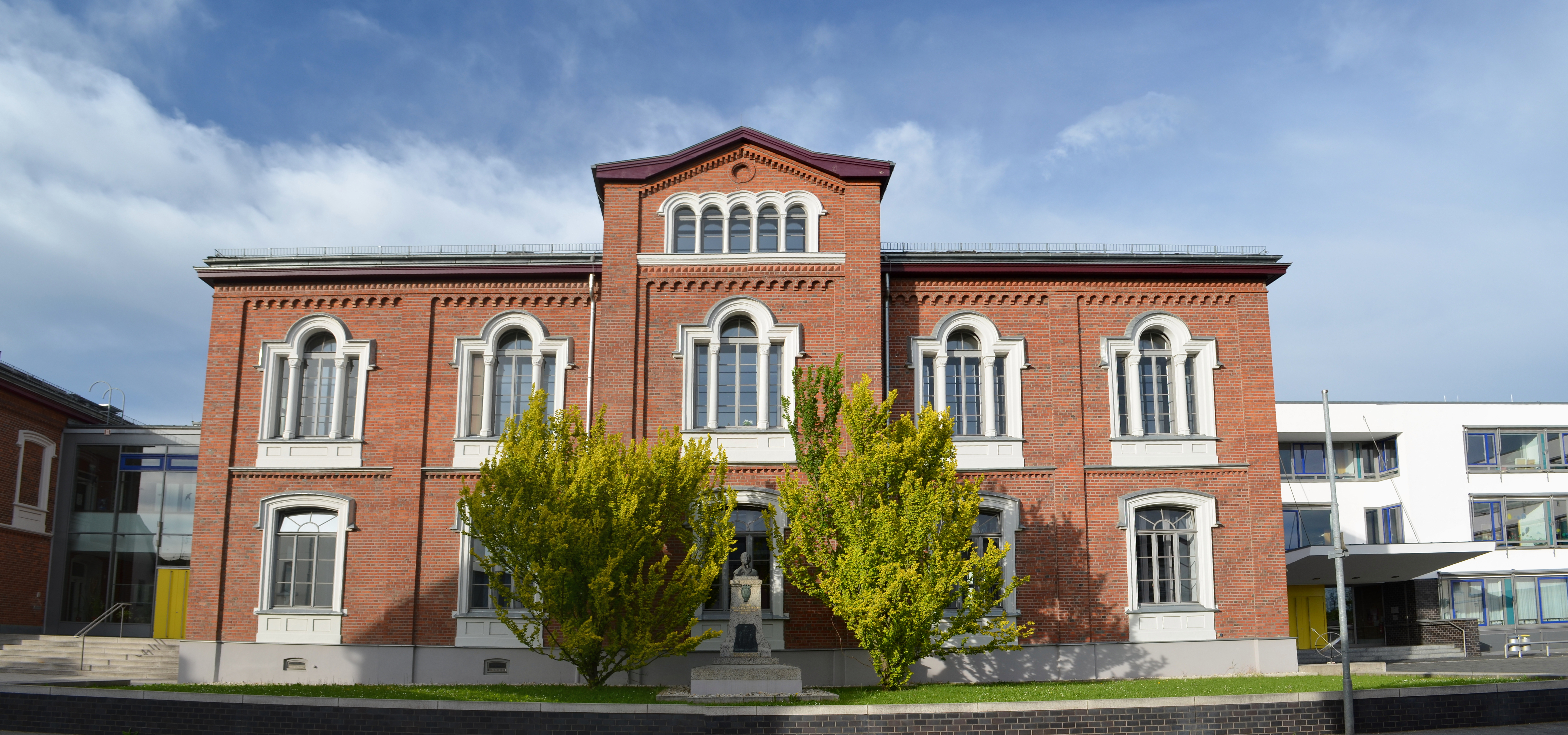 Bad Camberg, Freiherr von Schütz-Schule, Altbau